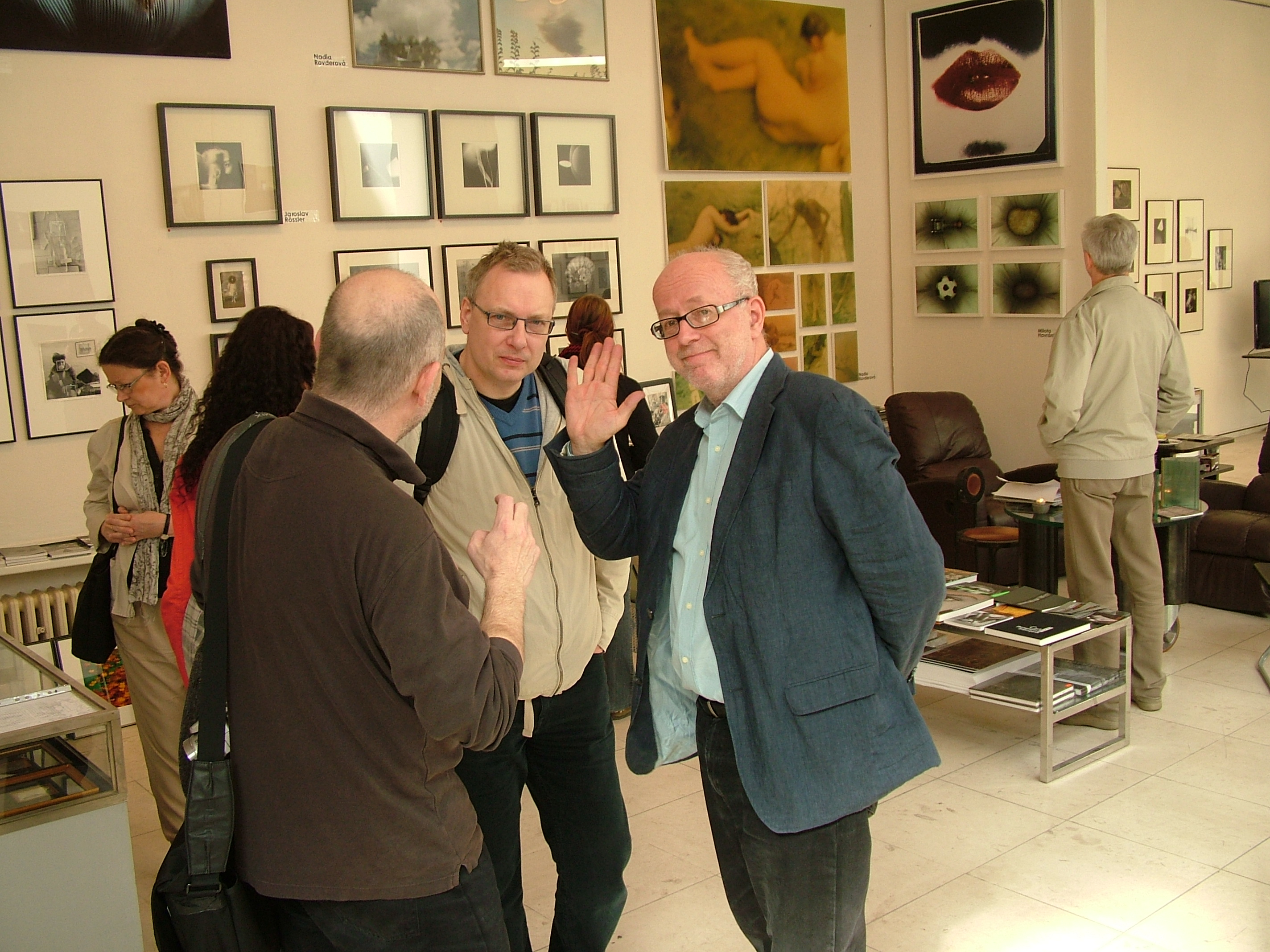 Výstava, festival, Prague Photo 2011 Budova: Mánes, Praha Trvání: od 4. dubna do 10. dubna 2011. Datum: 10. dubna 2011.